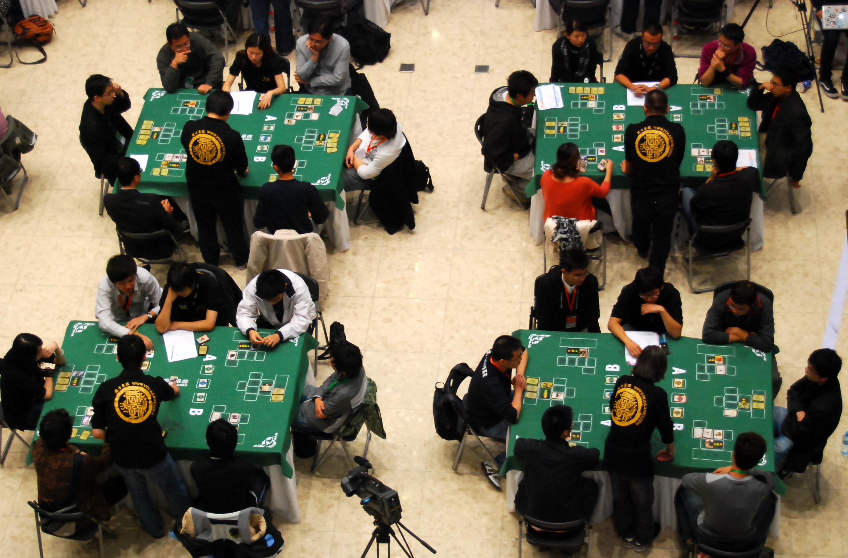 三国杀比赛当中